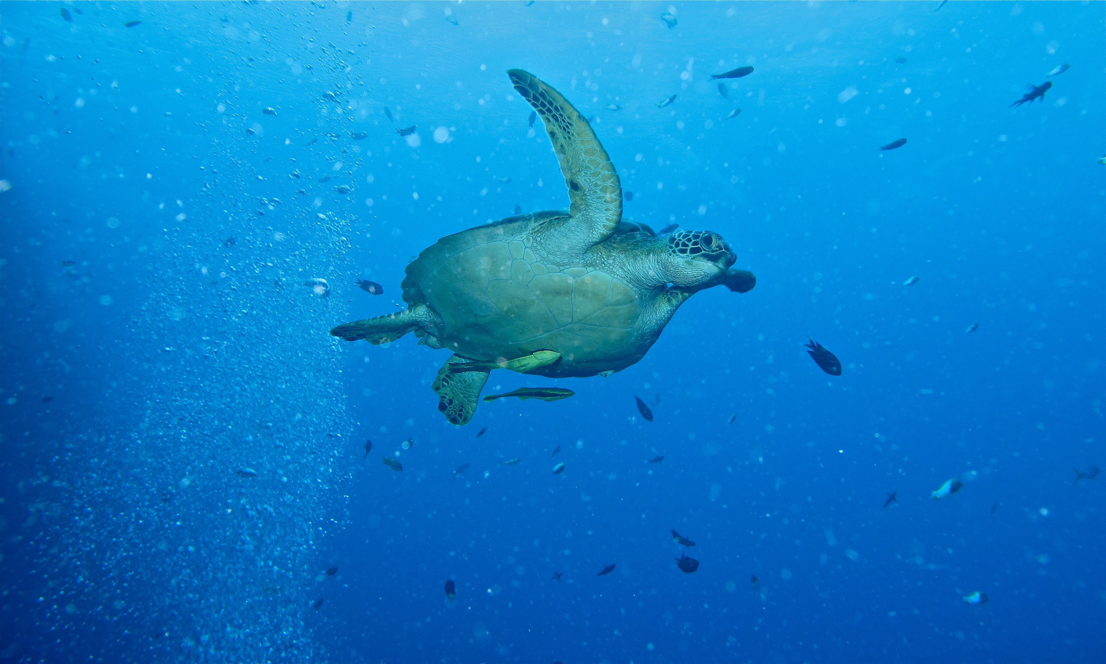 Likuan I, Bunaken Island, Sulawesi, INDONESIA